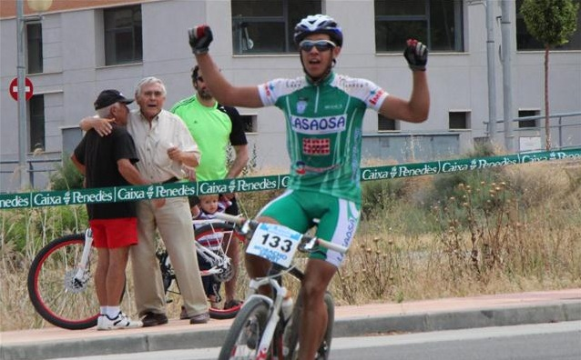 Cruzando la meta en los Ctos. de Aragon 2012